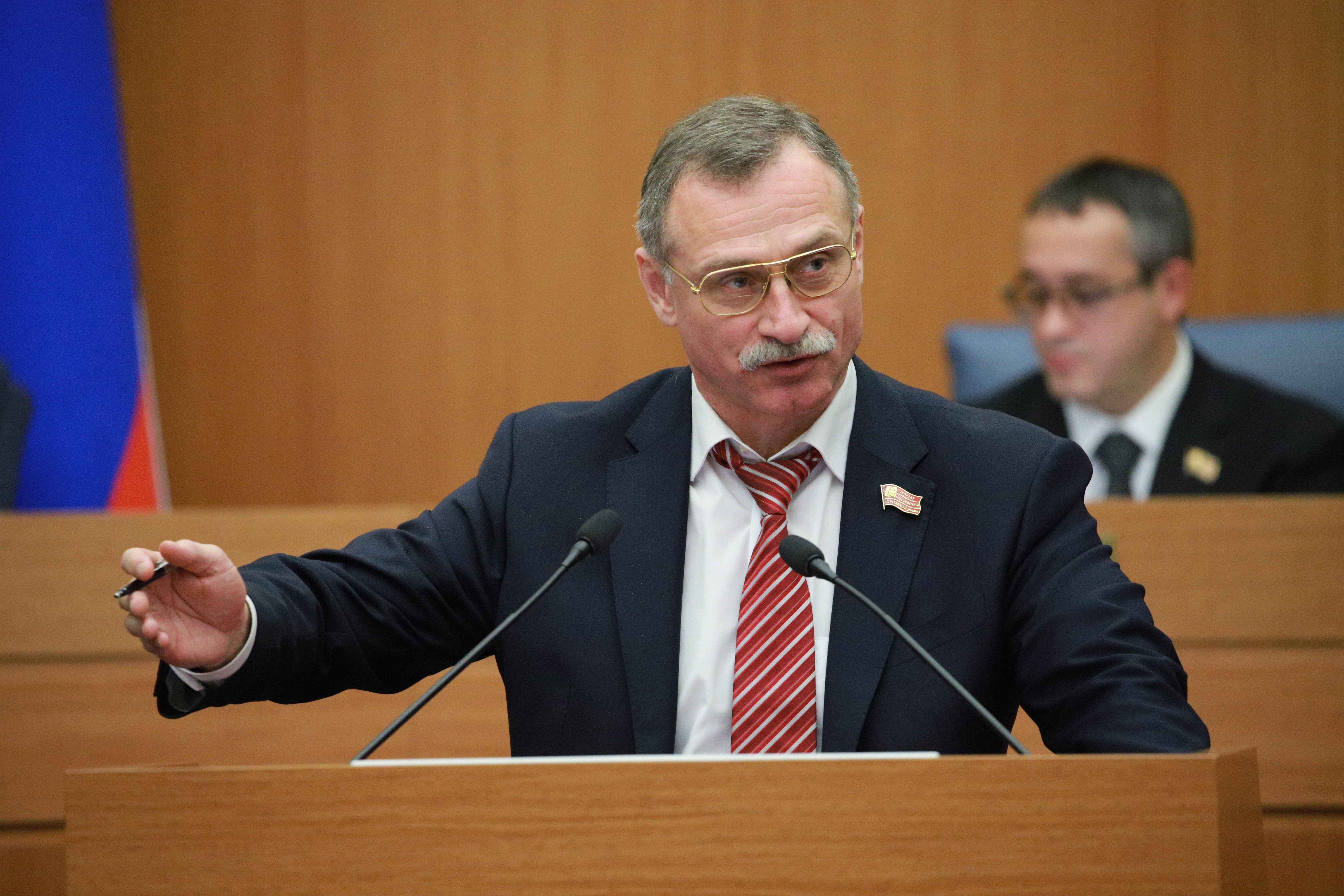 Выступление Михаила Тимонова в Московской городской Думе (ноябрь 2019)